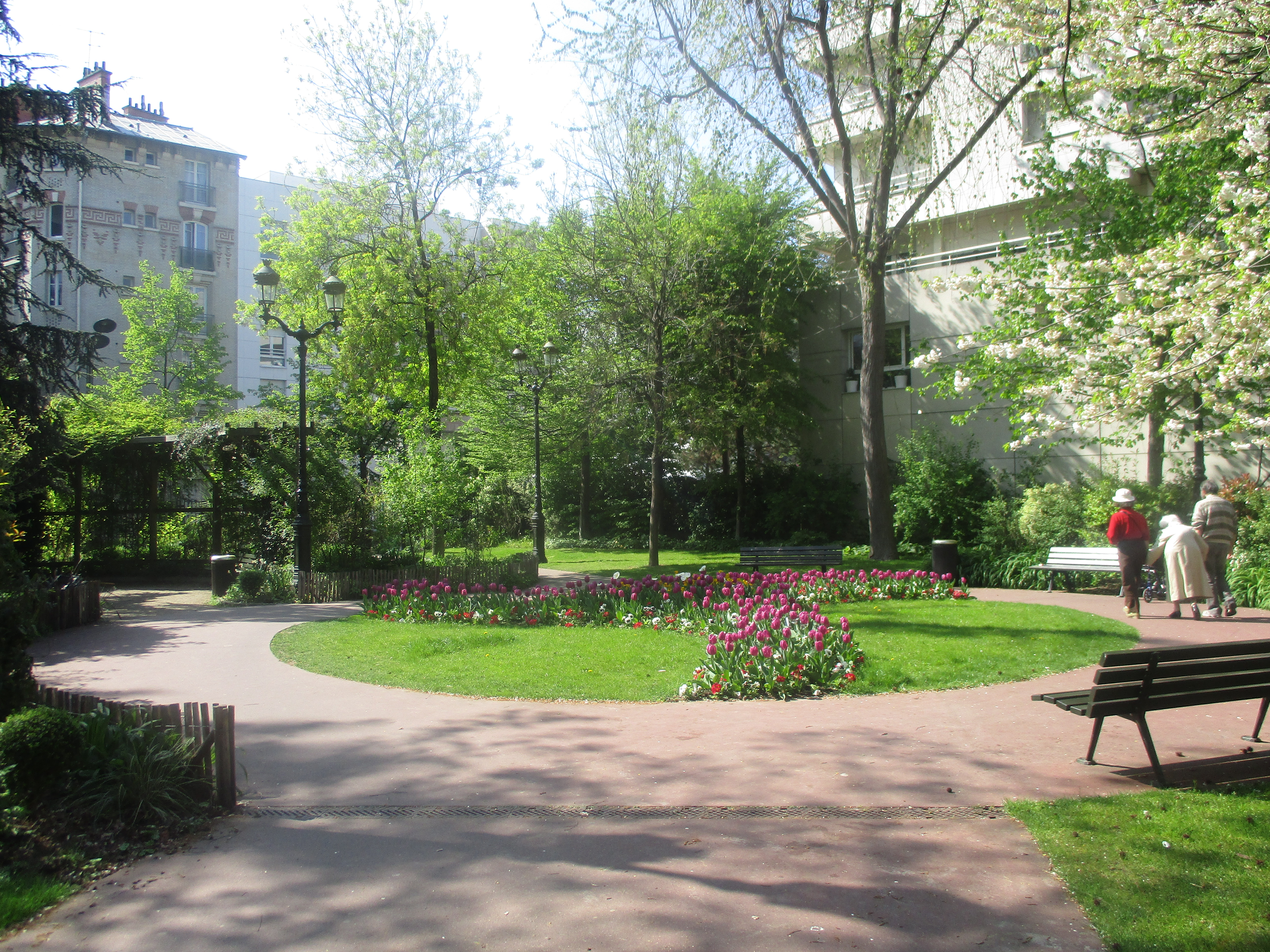 Le square Baudin, rue Baudin à Levallois-Perret (Hauts-de-Seine), au printemps.